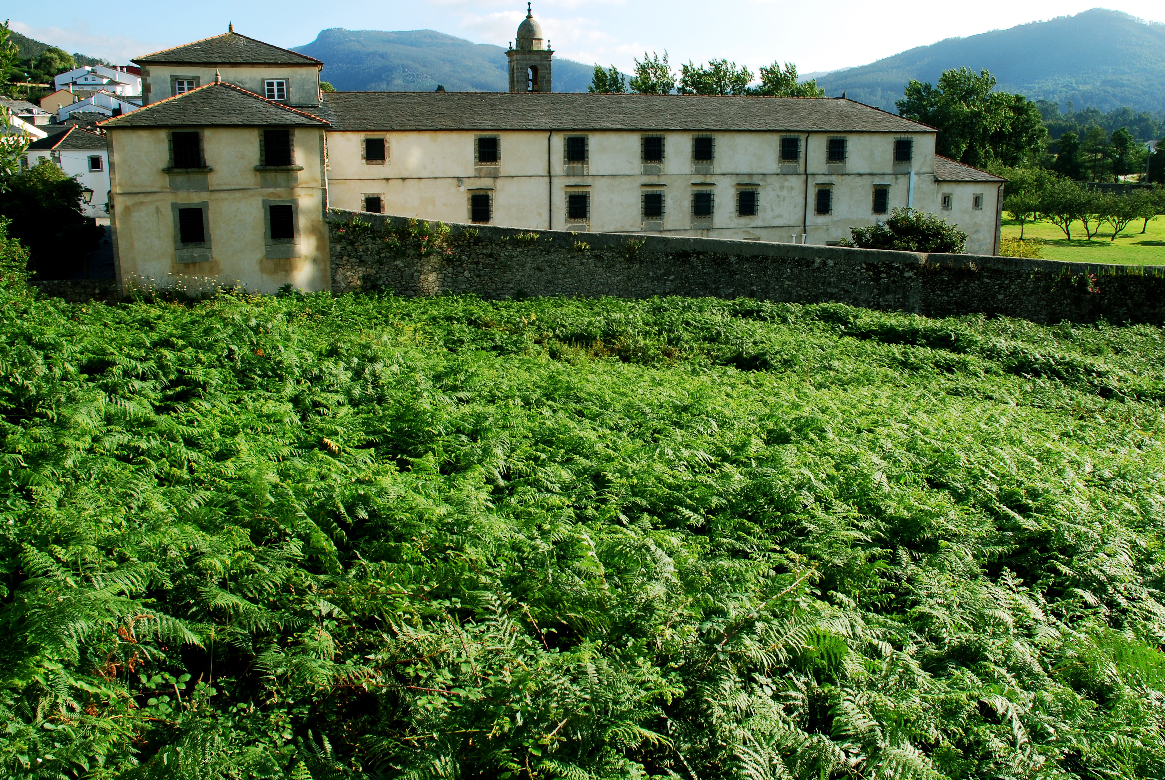 En Viveiro (Verxeles) fui a visitar el convento. Lo que más me gustó fue antes de llegar, un auténtico mar de helechos protege el convento.